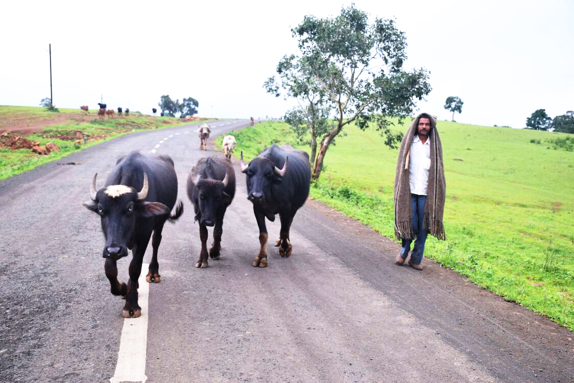 म्हशी चराई